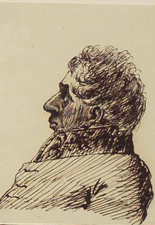 Marc-Étienne-Gabriel de Beauvau-Craon, pair de France